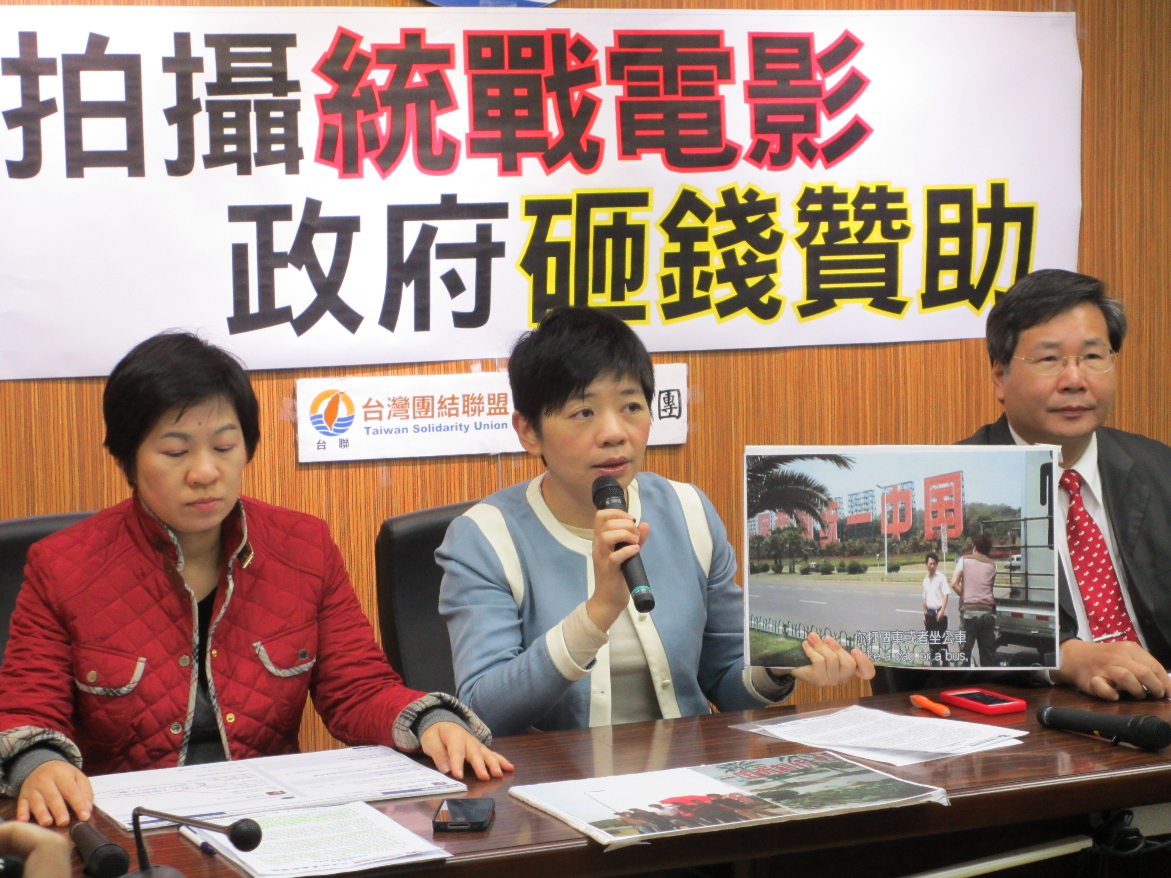 臺聯黨立法院黨團記者會批評，臺灣電影《搶救老爸》畫面出現“一國兩制、統一中國”標語